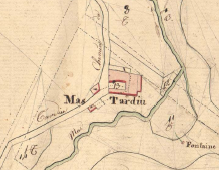 Darnac, o Mas Tardiu, en el Cadastre napoleònic del 1812 (Arxius Departamentals dels Pirineus Orientals)